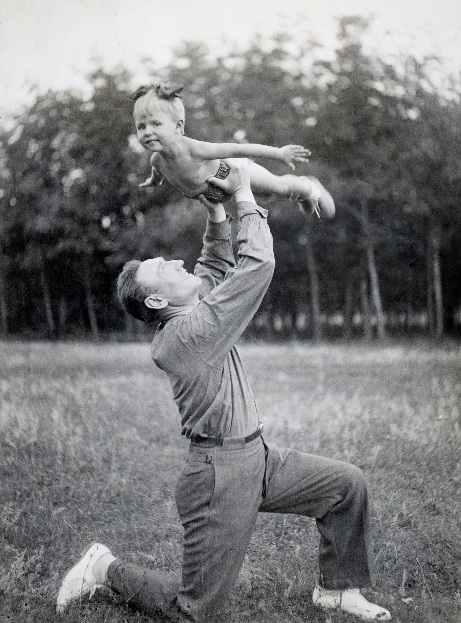 С.С. Бирюзов с дочерью Ольгой на даче